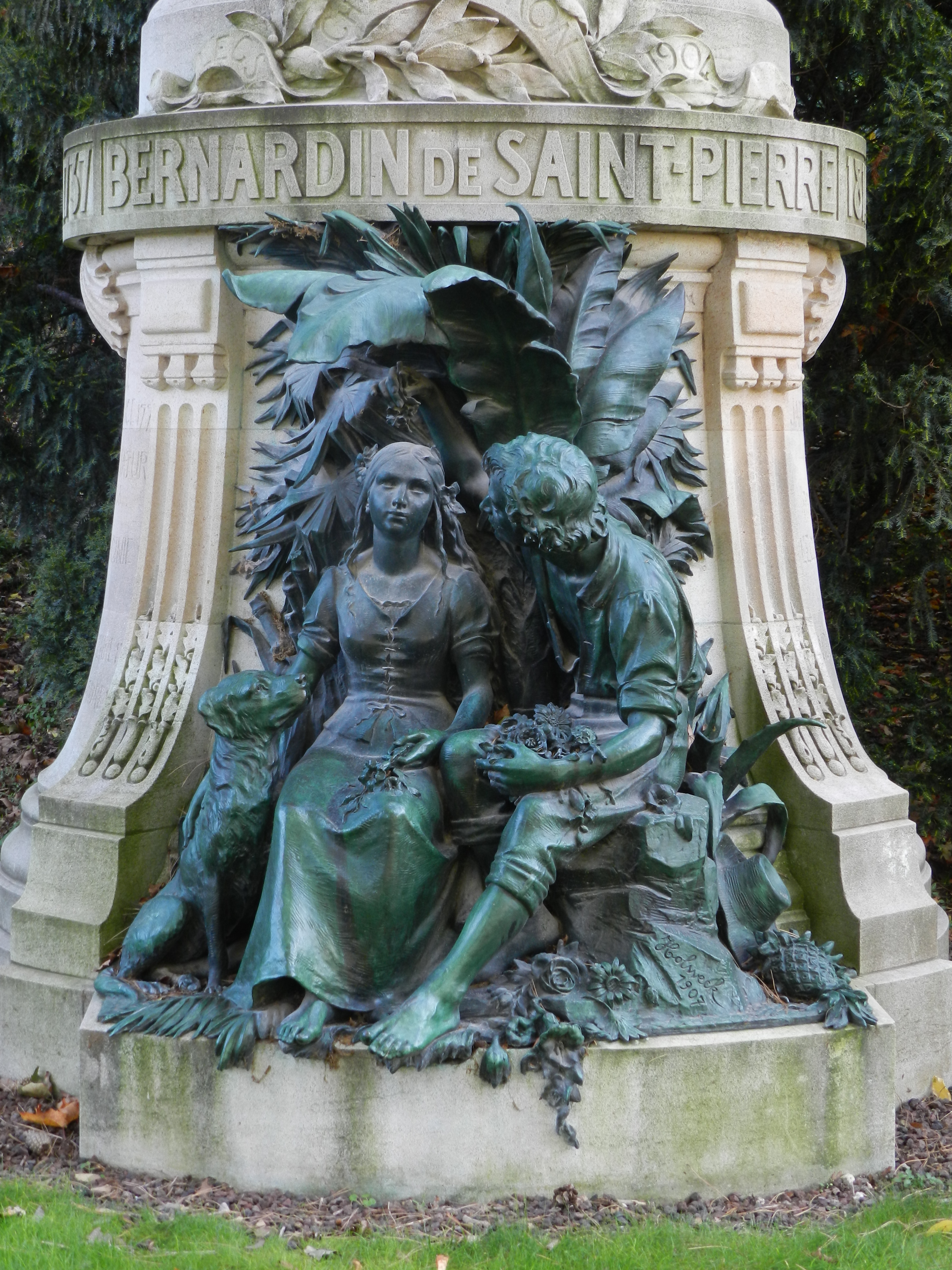 Monument Bernardin de Saint-Pierre du Jardin des Plantes, Paris, France.